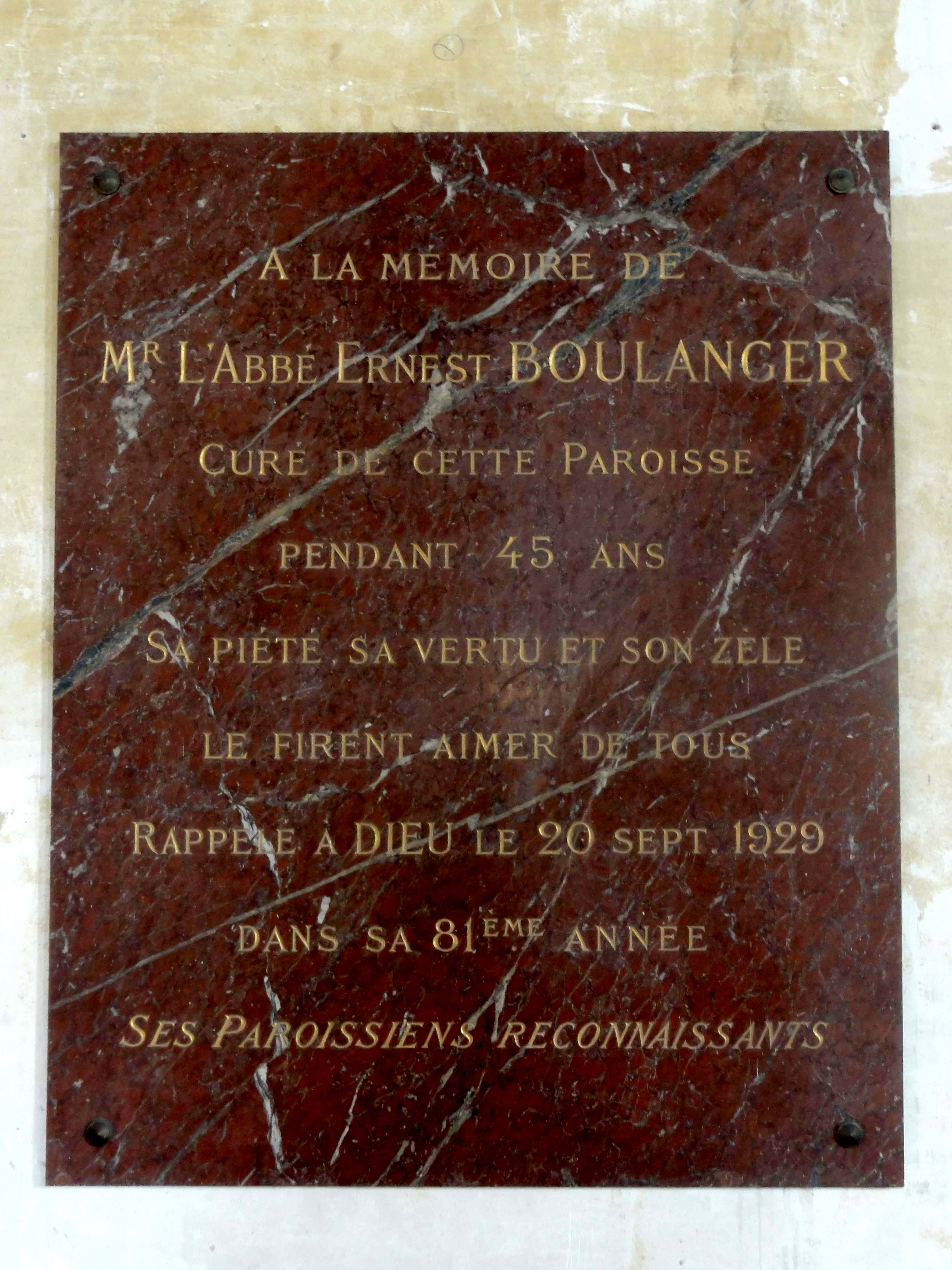 Plaque commémorative pour l'abbé Ernest Boulanger, mort le 20 septembre 1929.